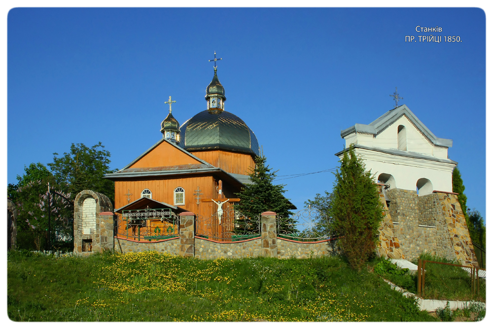 Станків. Церква Пресвятої Трійці, 1850 р.